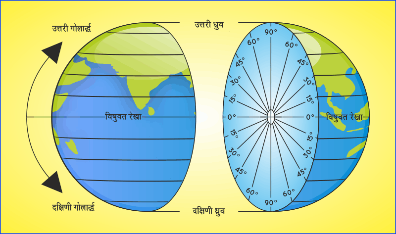 अक्षांश रेखाएँ